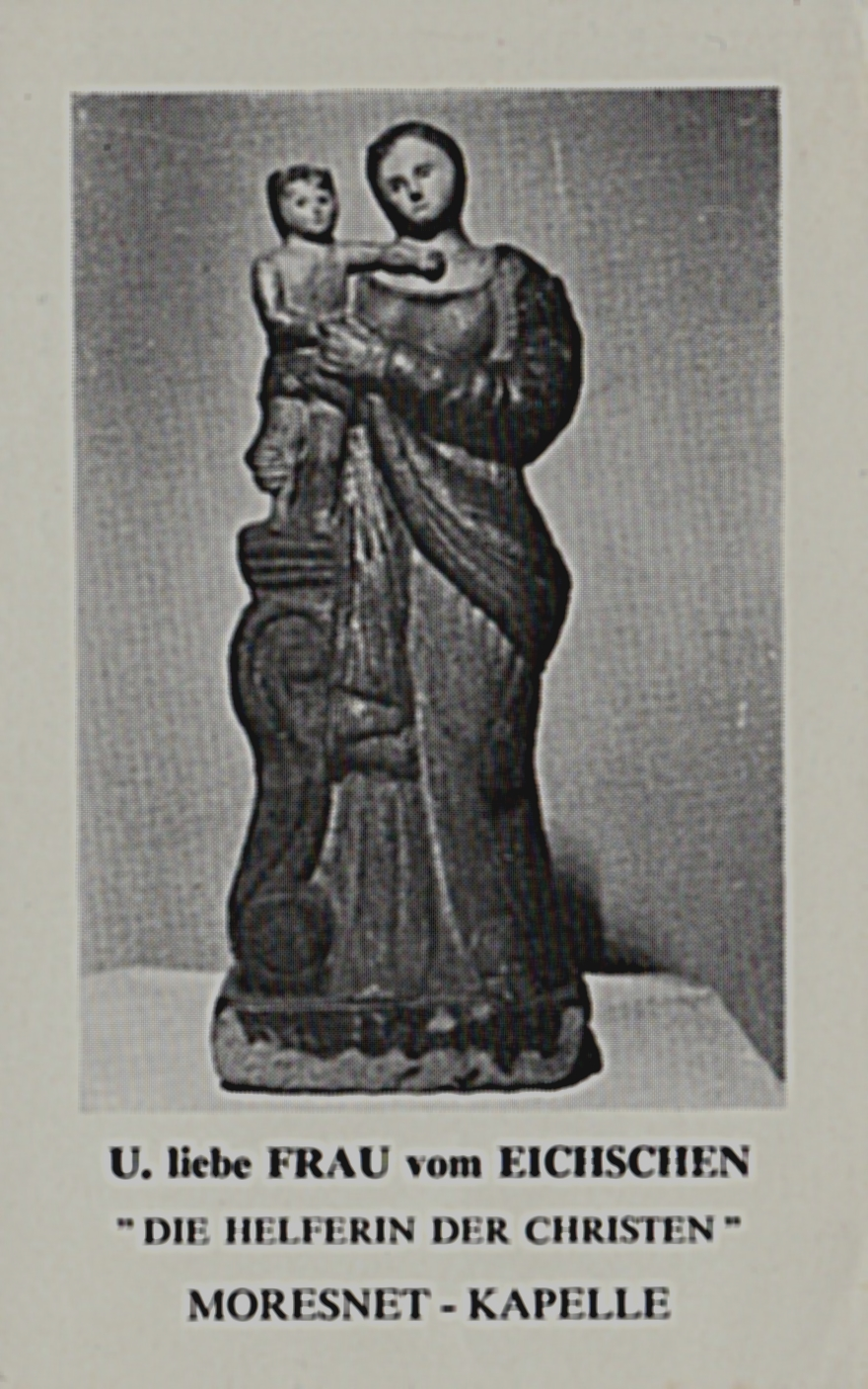 Andachtsbild der Wallfahrt zu Unserer Lieben Frau vom Eichschen in Moresnet-Chapelle (ca. 1970)